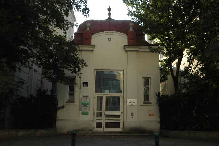 Haupteingang des ehemaligen Karolinen-Kinderspitals in der Sobieskigasse